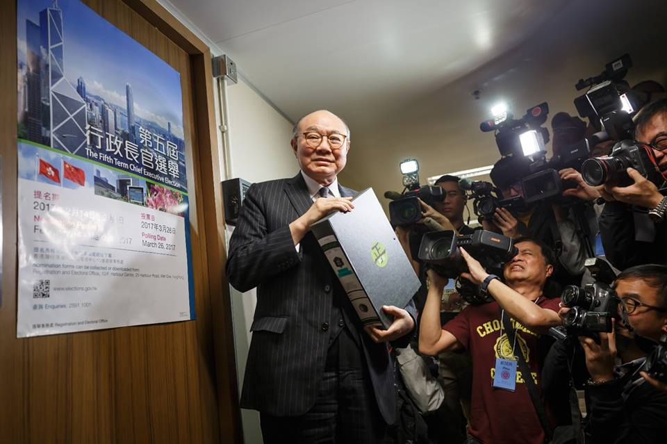 中文（香港）: 香港特首參選人胡國興。(胡國興社交網站圖片)